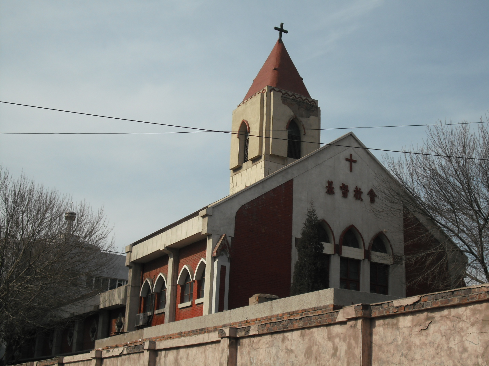 塘沽堂旧堂南面。